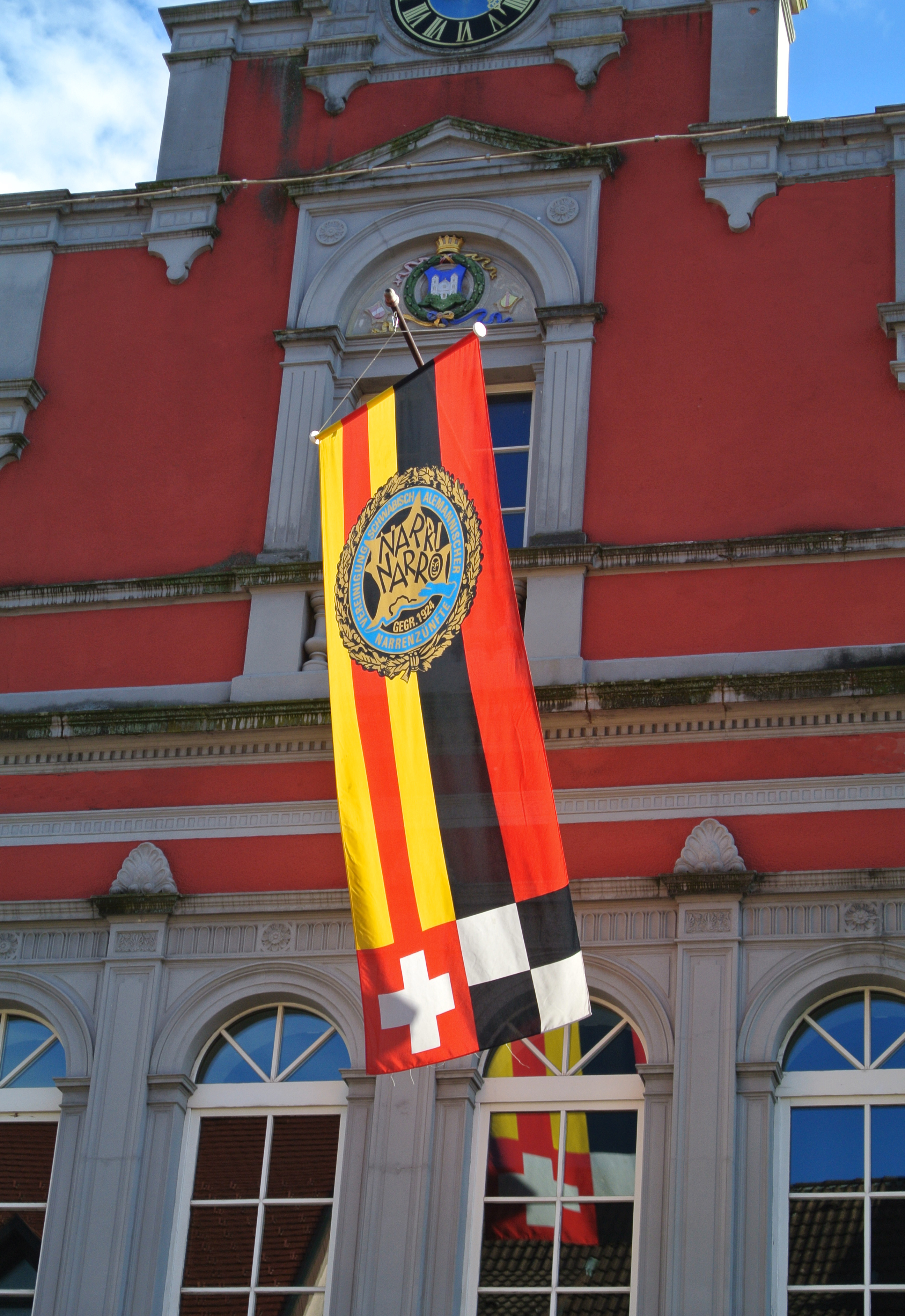 Die Fahne der Vereinigung Schwäbisch-Alemannischer Narrenzünfte hängt vor dem Rathaus in Waldkirch anlässlich des Jubiläums 150 Jahre Narrenzunft Krakeelia Waldkirch e.V.